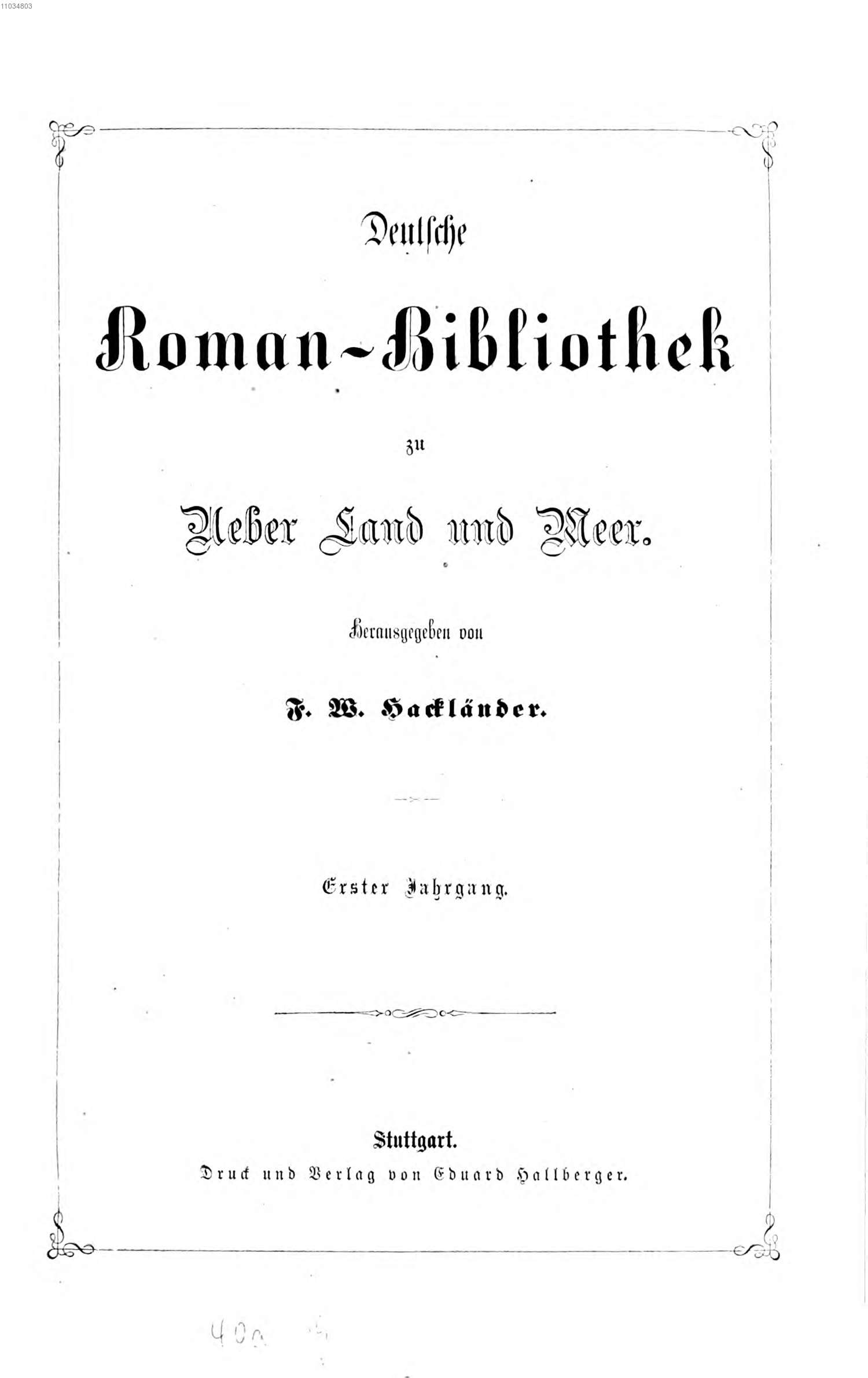 Deutsche Romanbibliothek, 1873, Titelblatt.